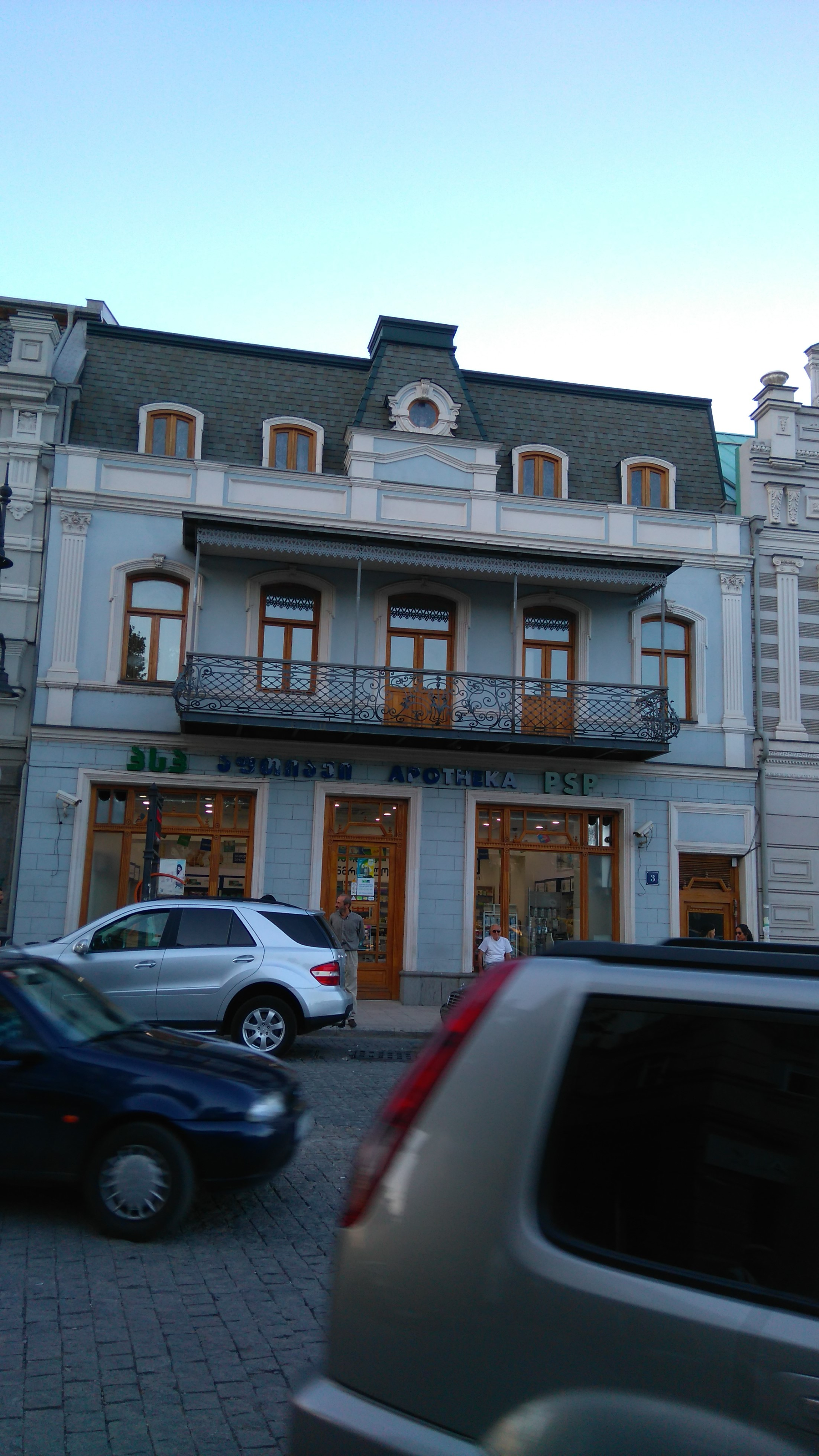 საცხოვრებელი სახლი